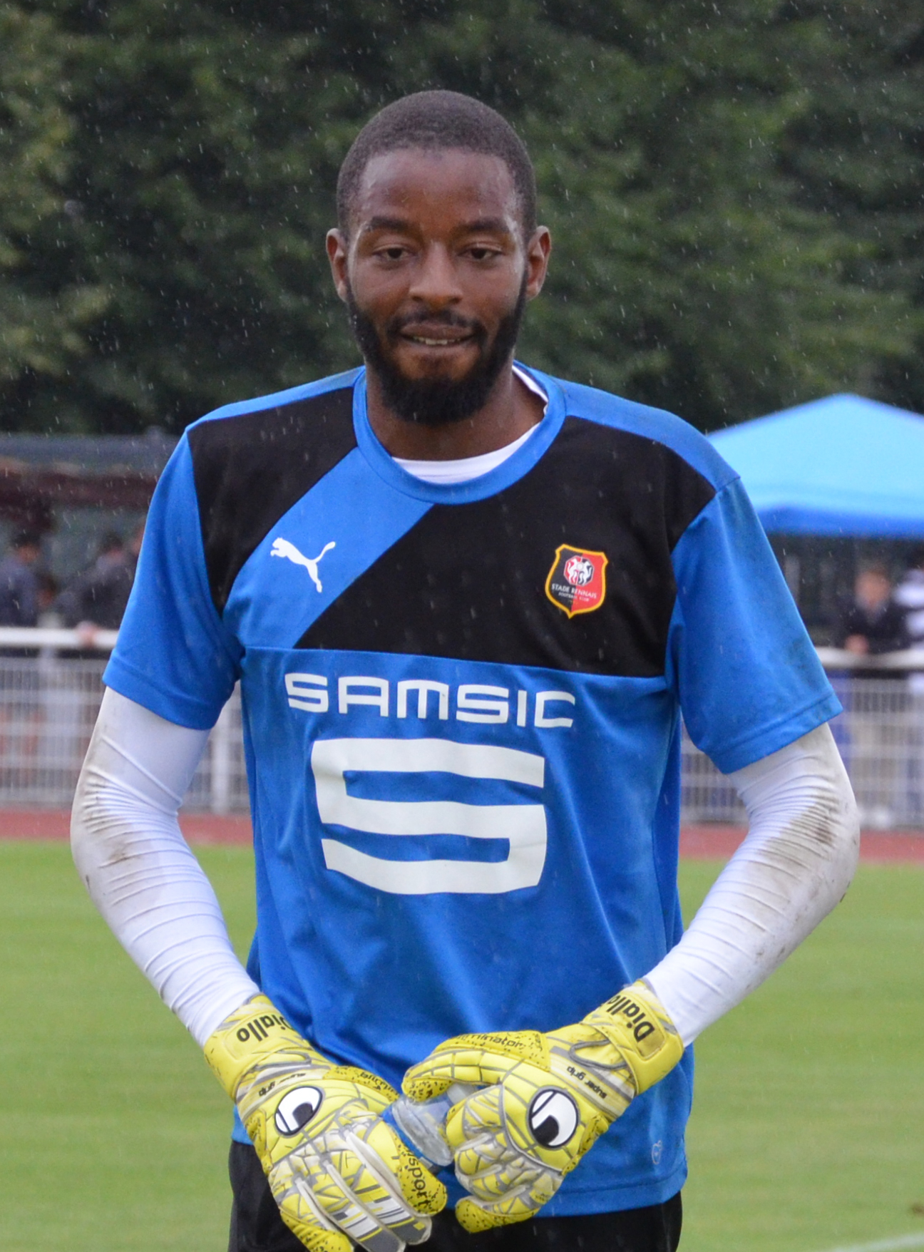 Photographie prise lors du match opposant le Stade rennais au SM Caen en match amical au stade Pierre-Compte de Vire le 22 juillet 2017. Ici, Abdoulaye Diallo.